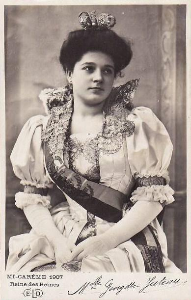 La Reine des Reines de Paris 1907 Georgette Juteau.